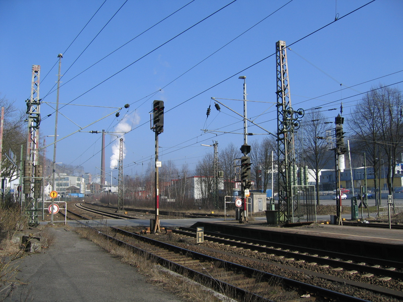 Description: Bahnübergang am Bahnhof Letmathe in Iserlohn. Source: selbst fotografiert Date: 19. März 2006 Author: Asio otus